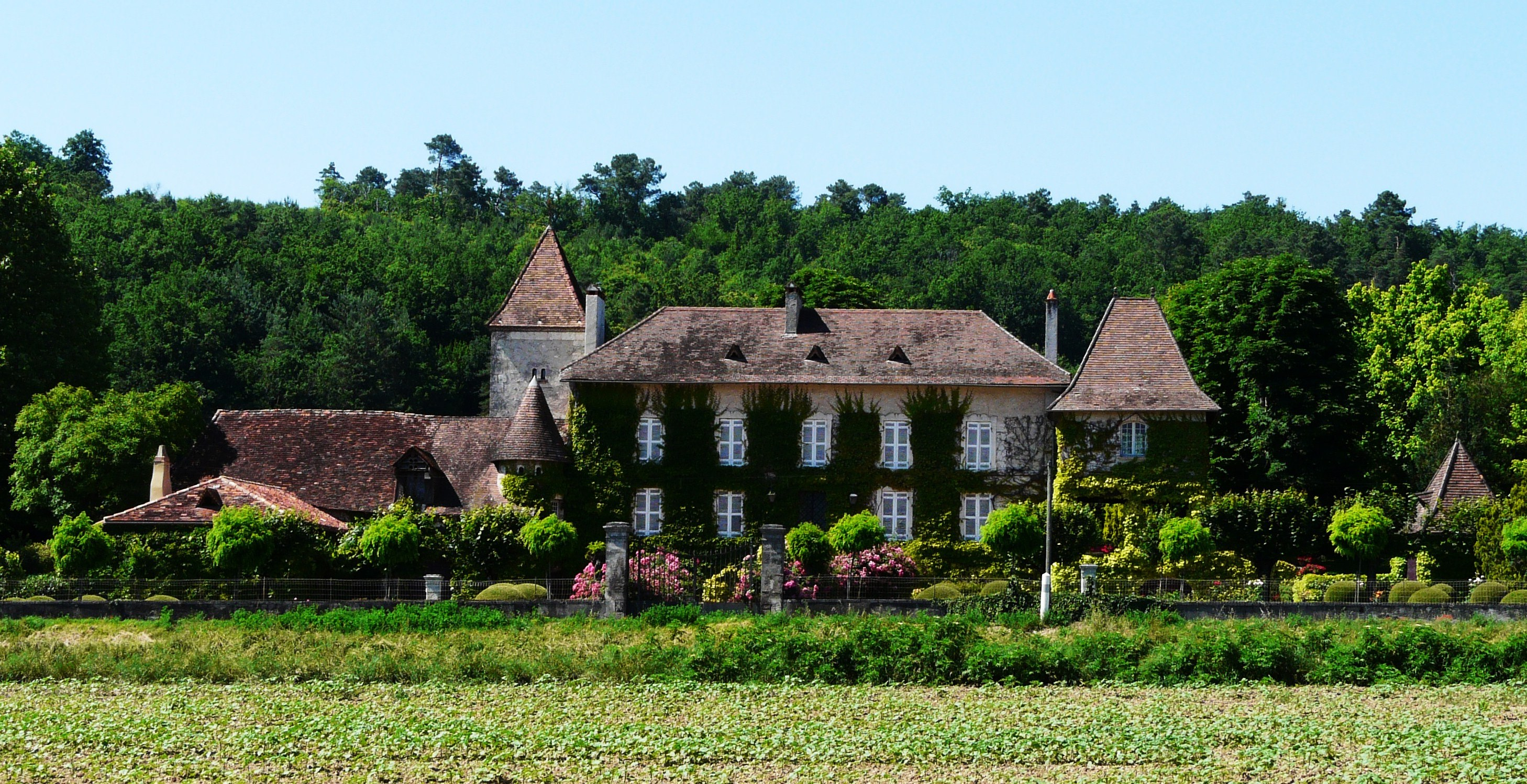 Maison ancienne, Bas Trigonant, Antonne-et-Trigonant, Dordogne, France